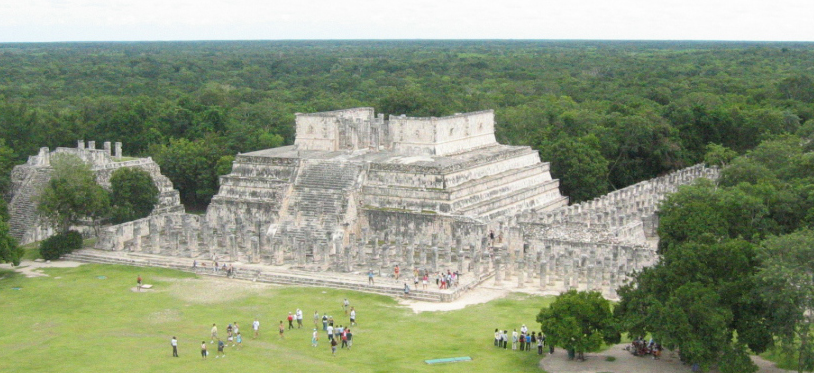 Chichen Itza - Mexique - Le Temple des Guerriers Jaguar Photo personnelle (ZeBBy) prise le 10 octobre 2004, Mexique Sous licence GFDL ZeBBy octobre 2004